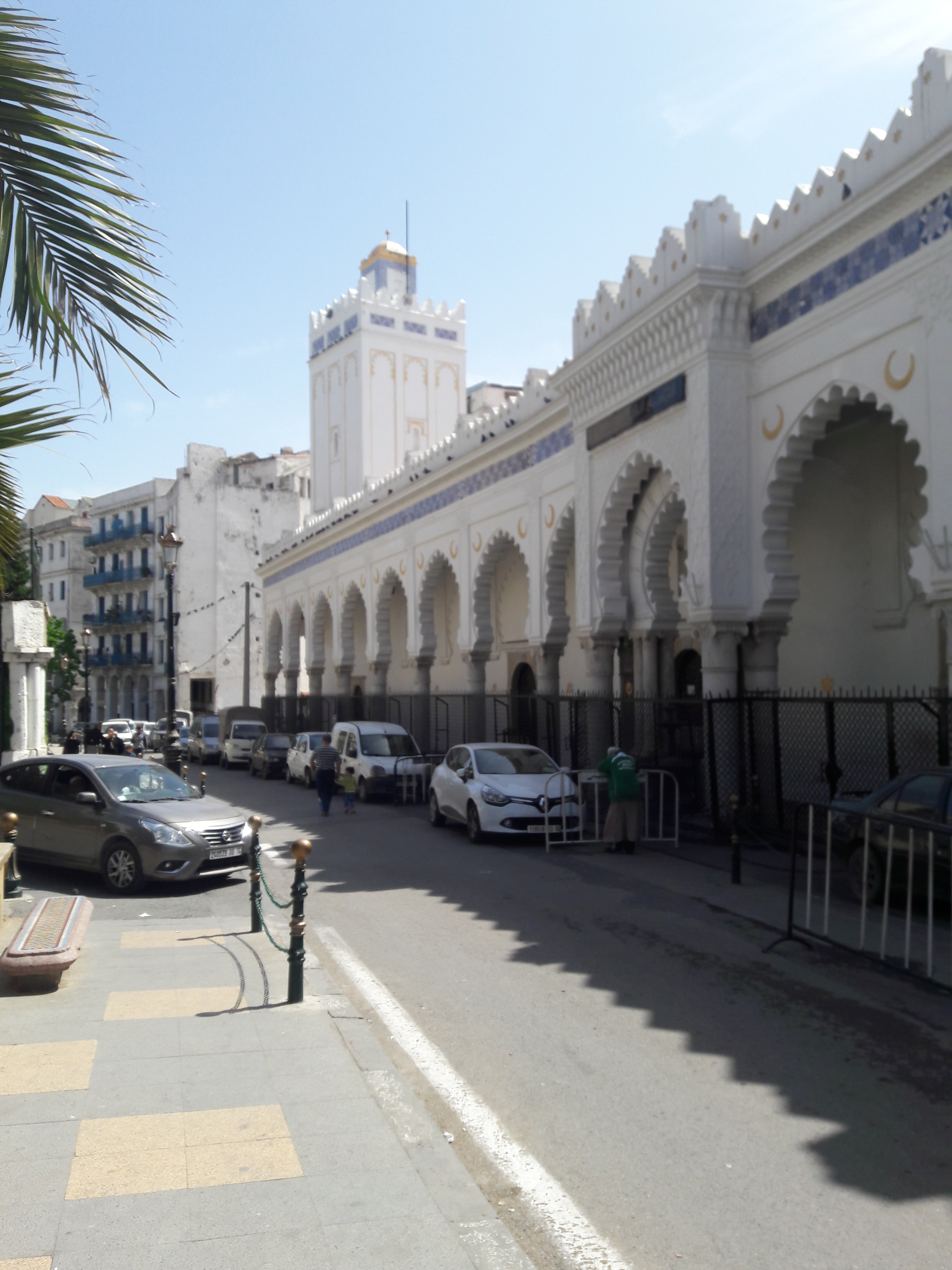 الواجهة الامامية للجامع